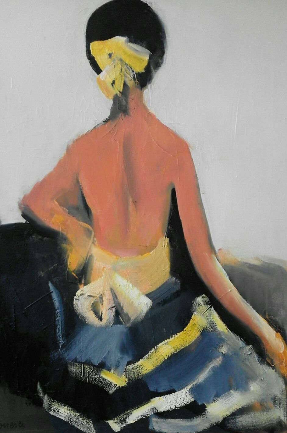 Balerină